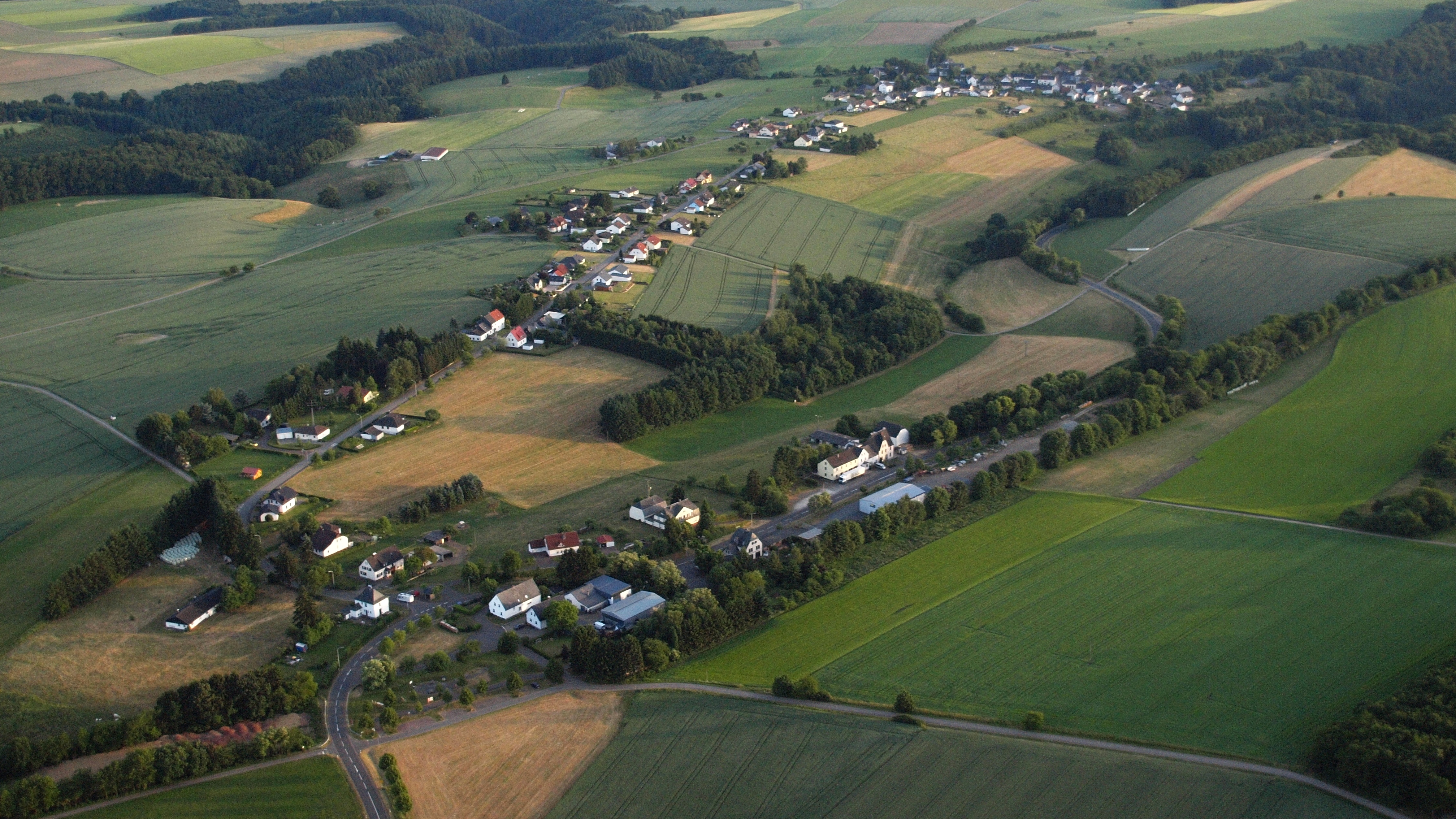 Pantenburg, Luftaufnahme (2015)